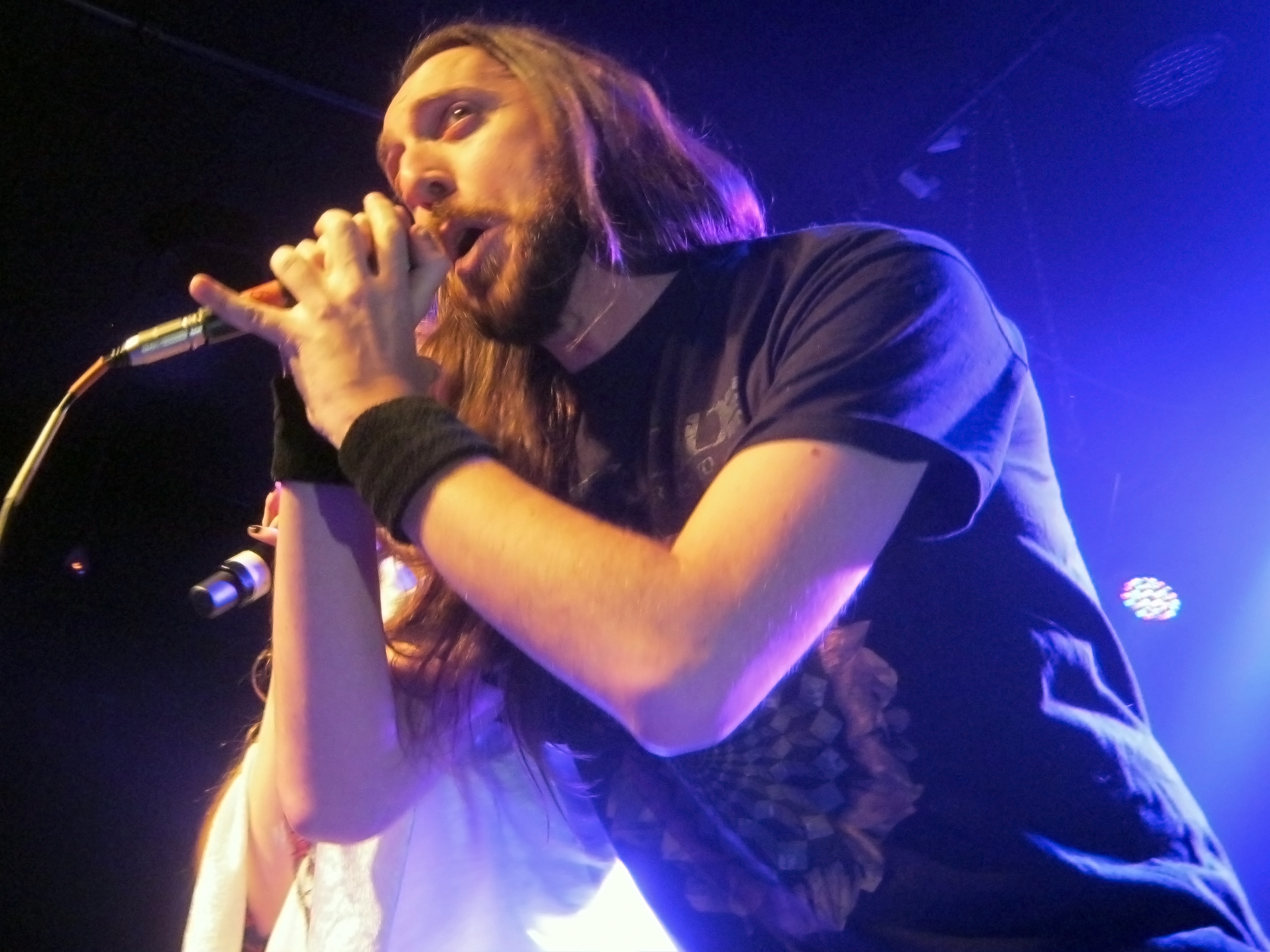 Yotam "Defiler" Avni, live gig 14/01/2016